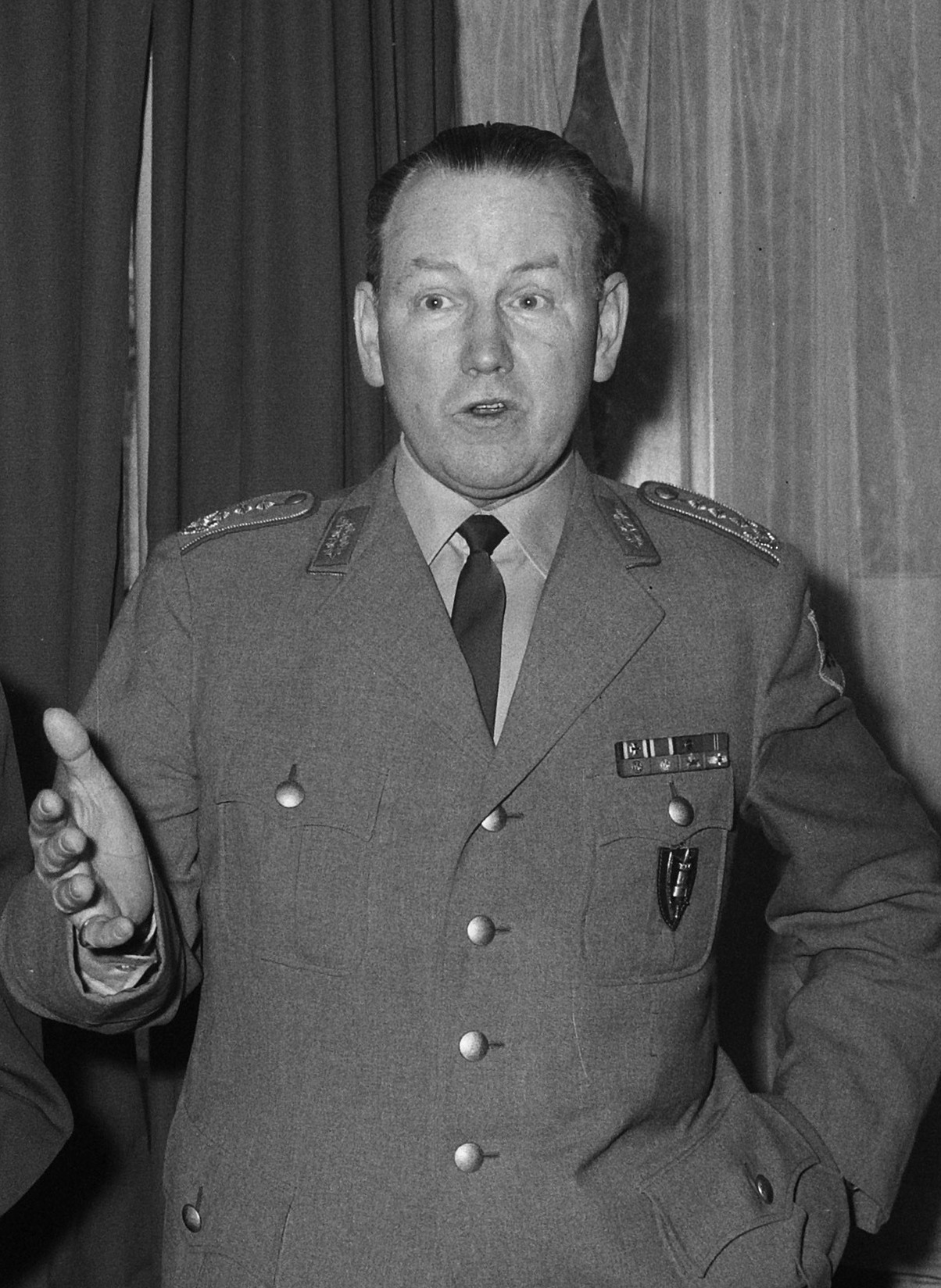 Generaal Von Kielmansegg inspecteerde het nieuwe hoofdkwartier te Brunssum Datum